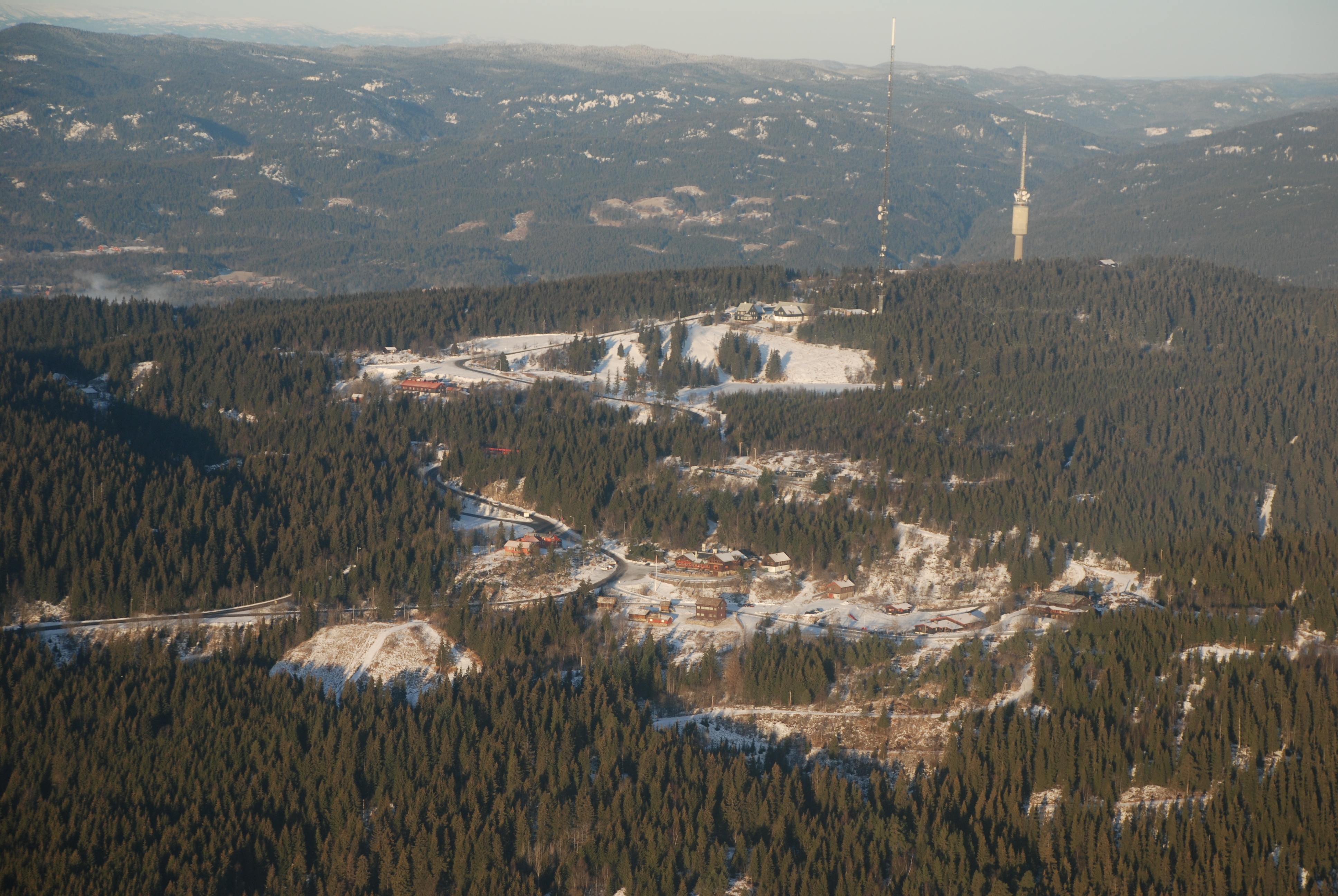 Tryvann in Oslo